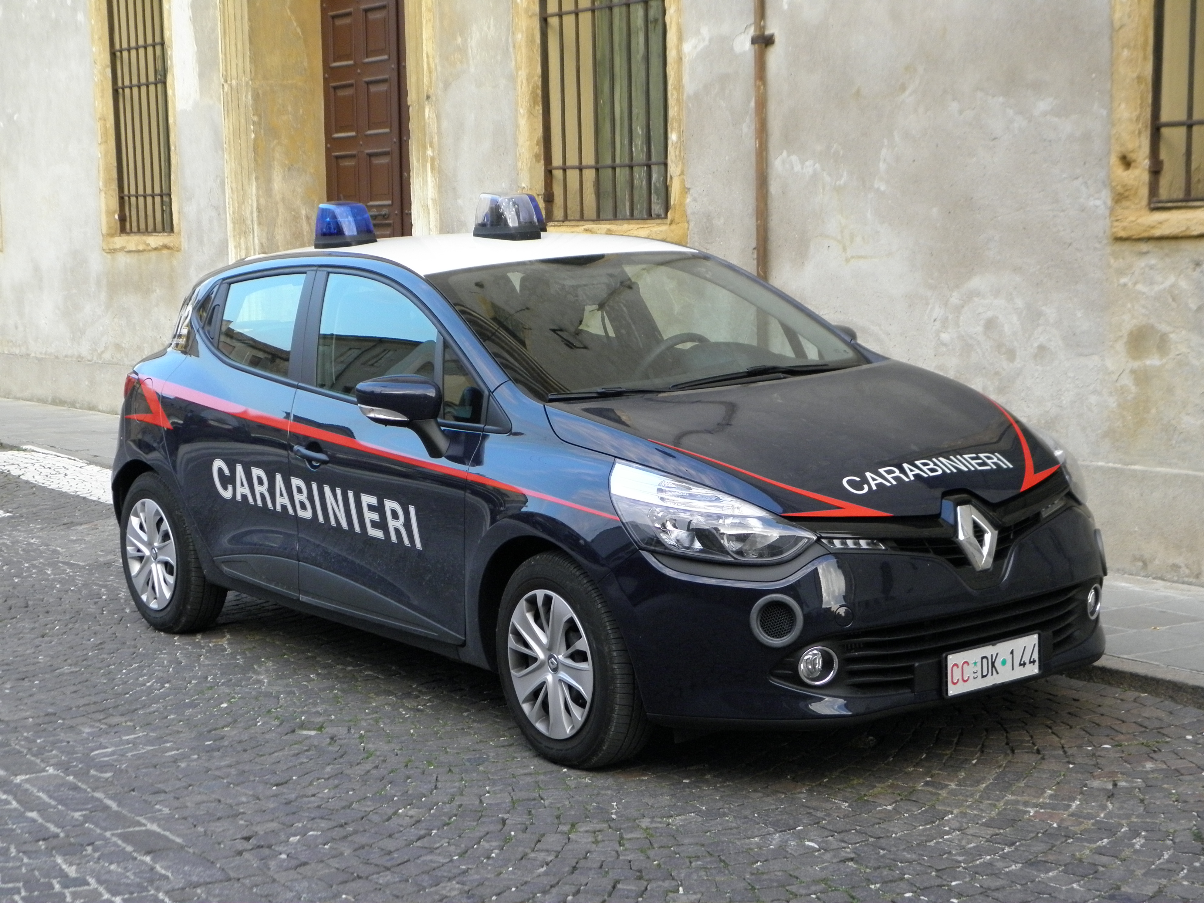 Este, Renault Clio dell'arma dei Carabinieri.